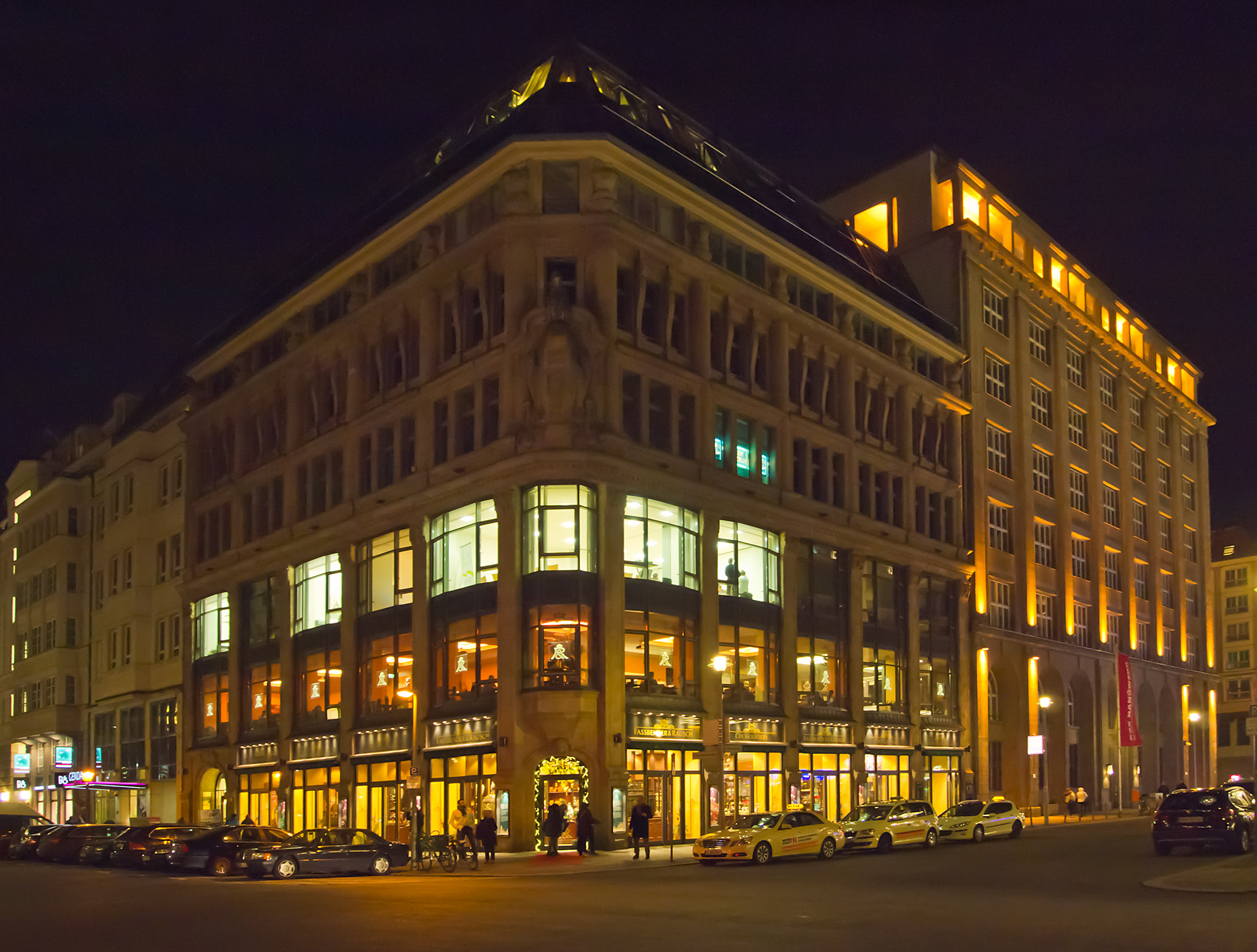 Geschäftshaus am Gendarmenmarkt in Berlin-Mitte, Charlottenstraße 60, Ecke Mohrenstraße mit:dem Geschäft und Café Fassbender&Rausch (Rausch Schokoladen) Chocolatiers, (O3038281-dvh)